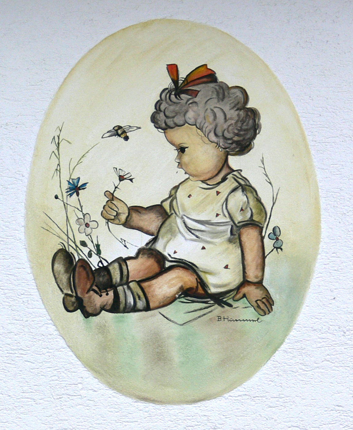 Bad Saulgau, Sießen, Wandbild am Äußeren eines Wohnhauses, nach einer Vorlage von Maria Innocentia Hummel